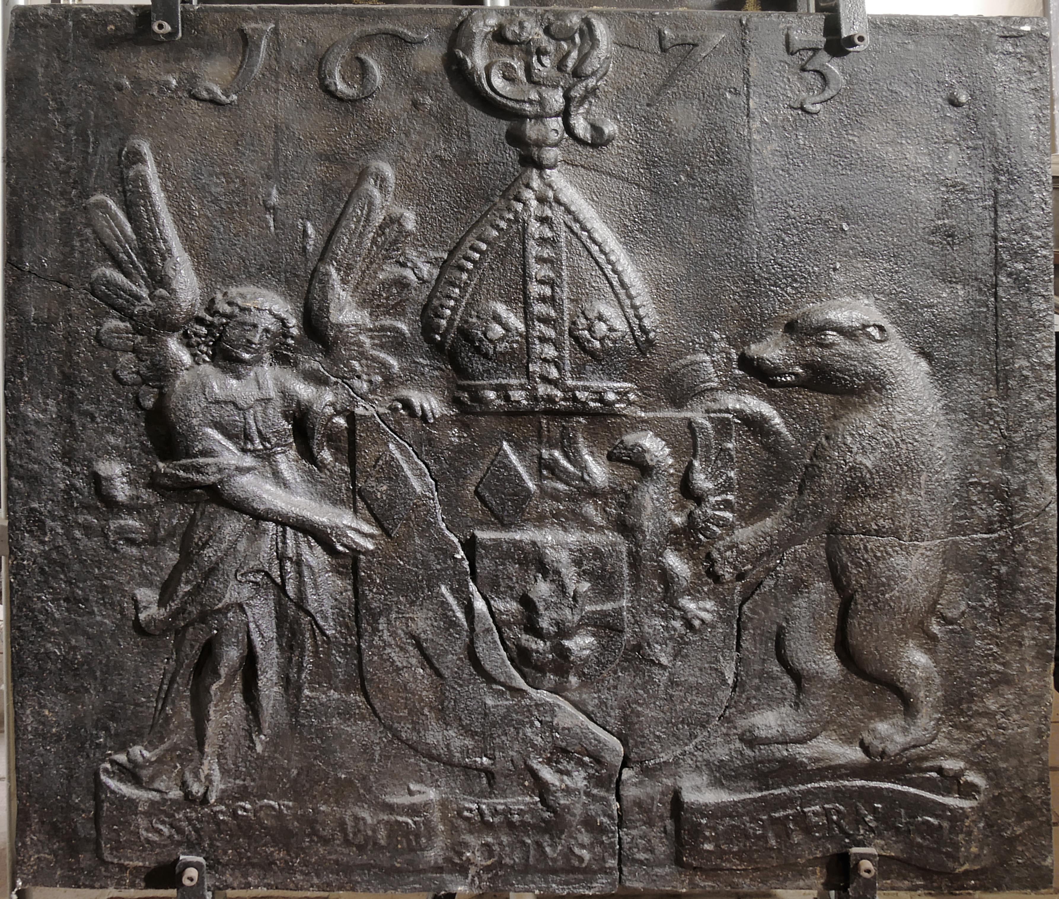 Kaminplatte oder Takenplatte mit dem Motiv des Wappen de Philipp de Neuforge, Abt in Echternach 1667-1688. Datiert 1673. Abtwappen mit Schwurhand und dem Reichsadler als Zeichen der Reichsabtei Echternach, Weilerbach Inschrift: ASSVESCE LABOR(I), SVB MANV SANCTI DEI ECHTERNACH (auf dieser Platte nicht vollständig lesebar, die Info stammt von einer hier besser erhaltenen Platte, die bei Driesch abgebildet ist). Weilerbach 1673 Platte mit zusätzlicher Randleise in Driesch VDD Abb 82 dargestellt Bei der Platte handelt es sich möglicherweise um einen Nachguss